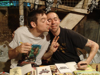 Gnot faisant un bisou à Dav